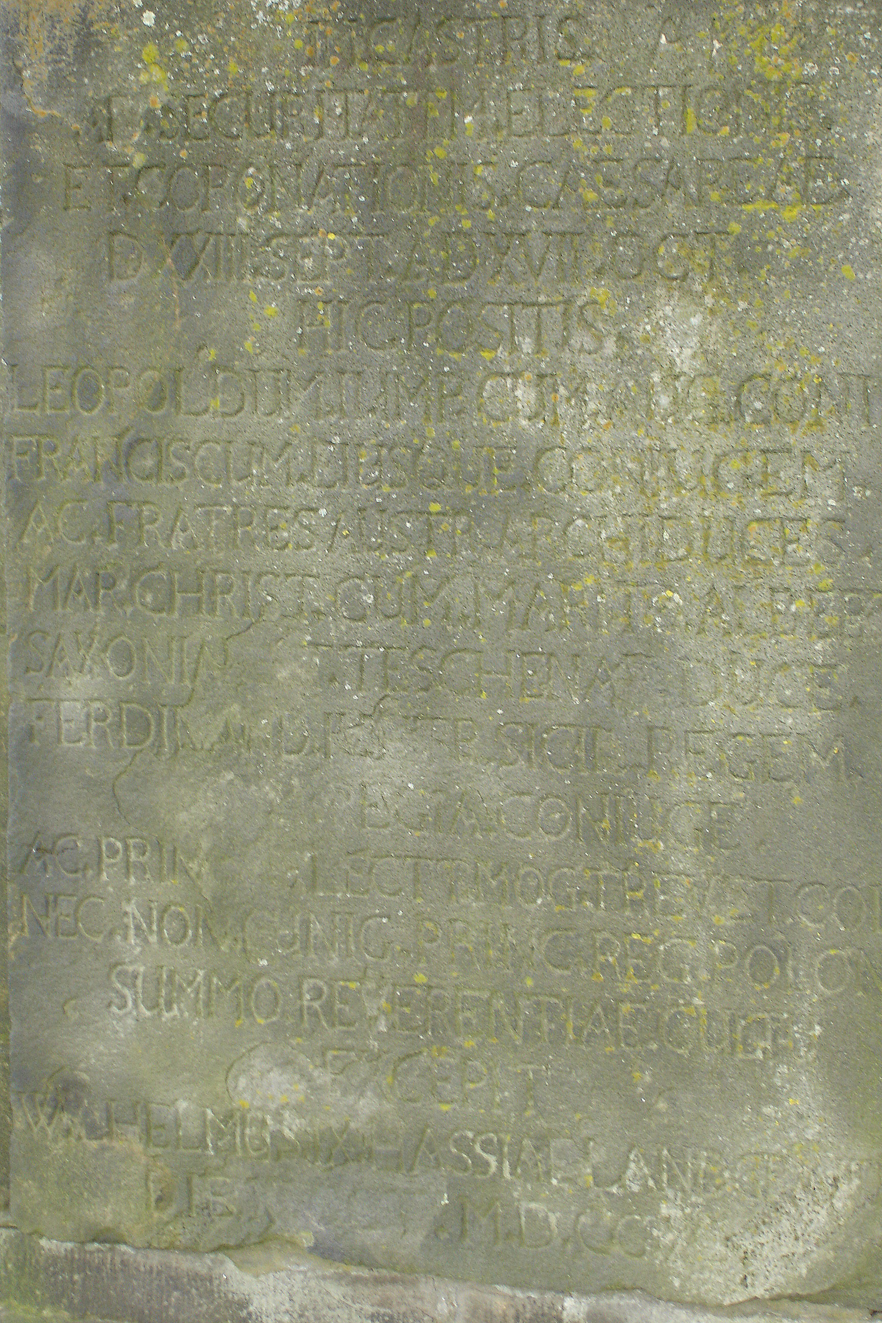 Inschrift der Ehrensäule zur Kaiserkrönung von Leopold II. (1790) in Frankfurt am Main.